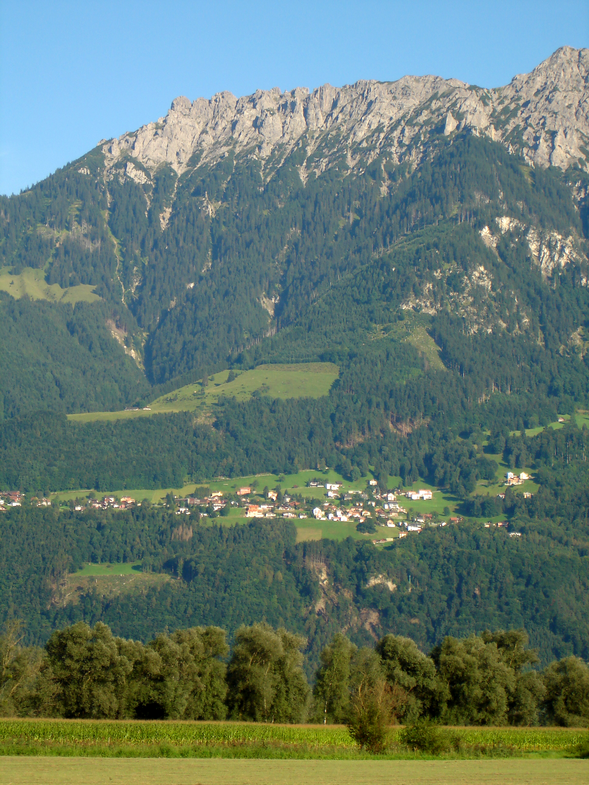 Liechtenstein: Blick auf Planken